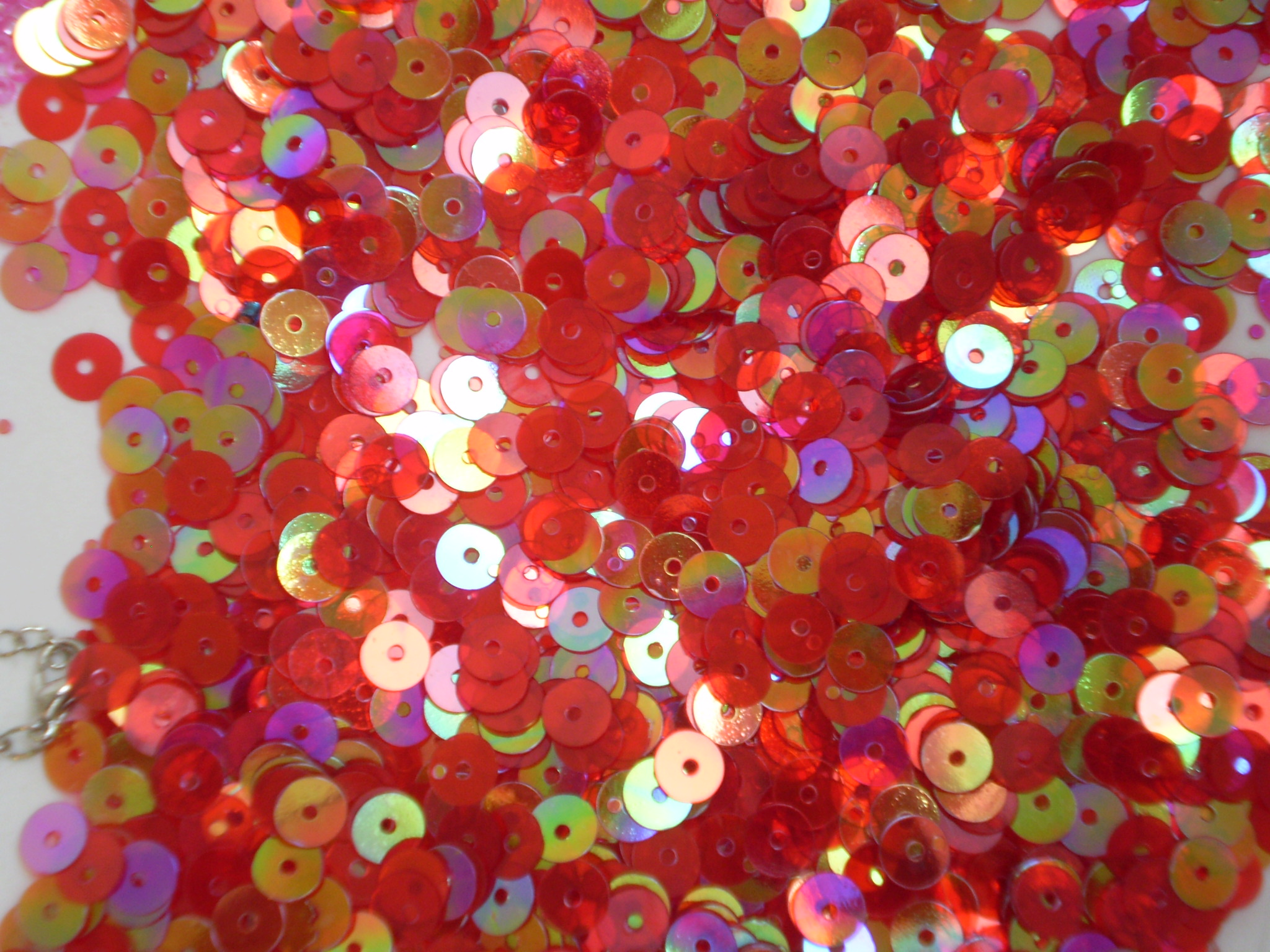 paetê, ornamento para bijuterias